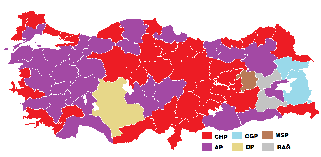 1973 genel seçimleri sonuçlarının Türkiye haritasında gösterimi.